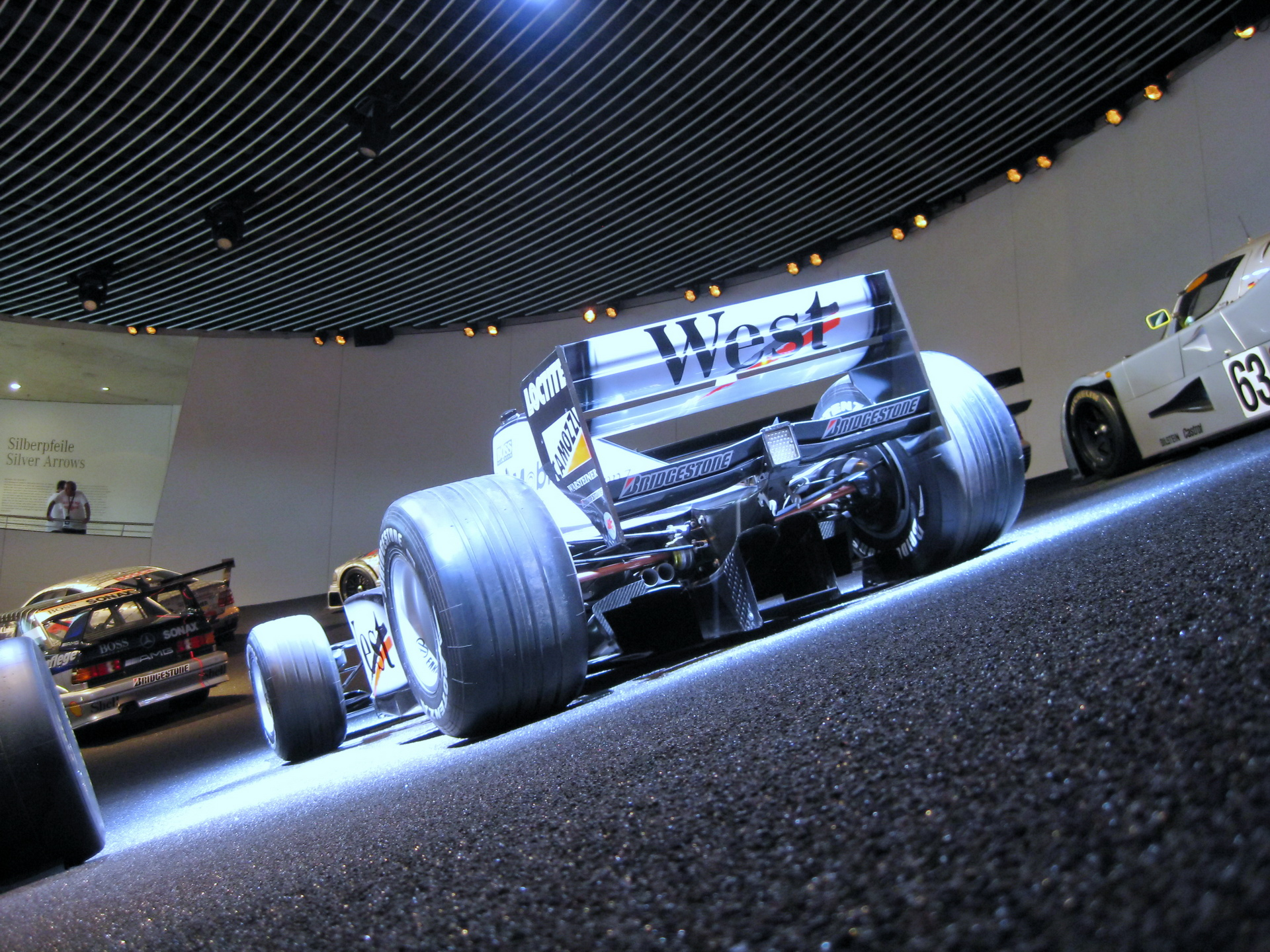 Vue arrière de la McLaren MP4/13 de Mika Häkkinen, exposée au musée Mercedes de Stuttgart